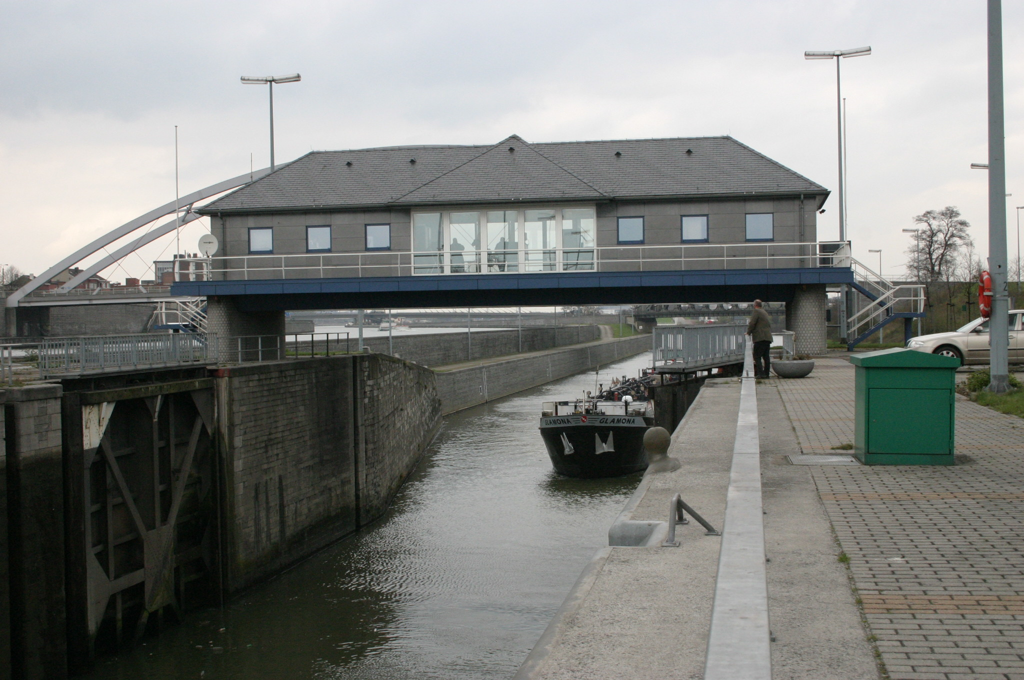 Monsin-Schleis.